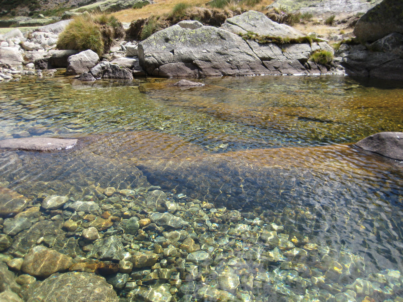 Poza en la Garganta de los Caballeros, Navalonguillla, provincia de Ávila. Se encuentra entre el último refugio y la laguna en la subida a la Garganta.